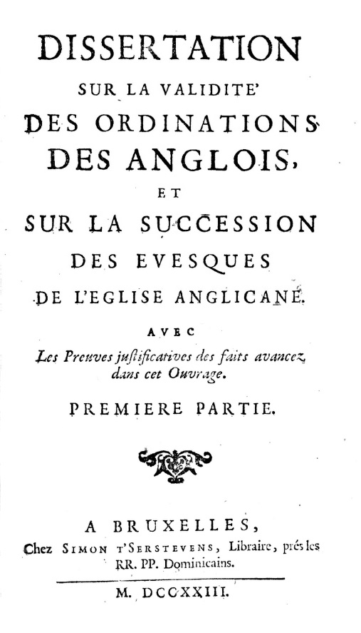 Pierre François Le Courayer: Dissertation sur la validité des ordinations des Anglois. Bruxelles 1723